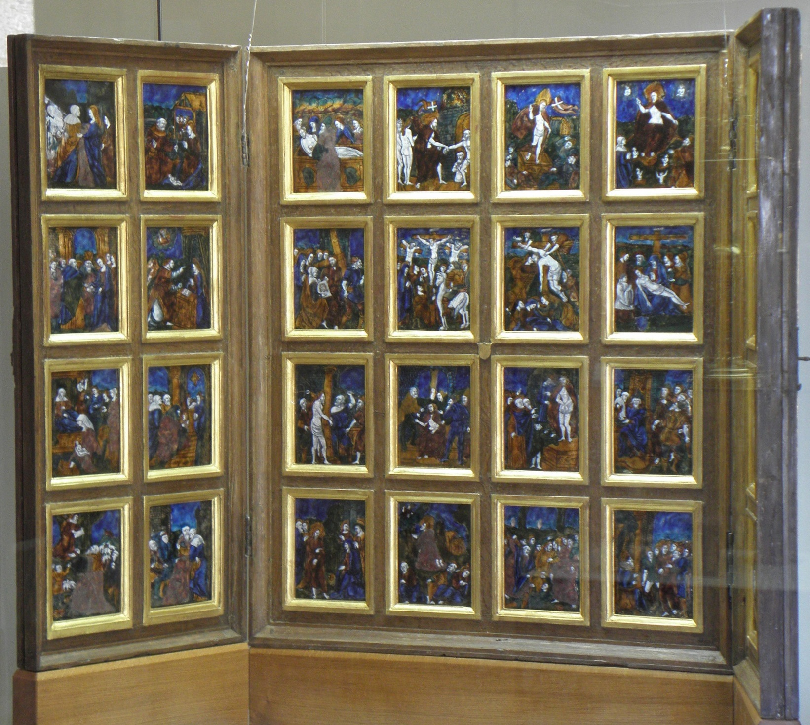 Retable de la Vie de la Vierge et du Christ sis tour de l'oratoire au Musée du Château de Vitré (35) et provenant de l'église Notre-Dame.